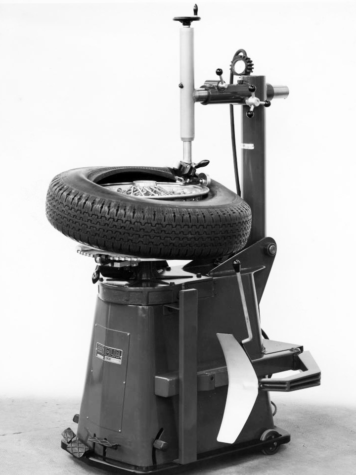 Smontagomme "Artiglio" della Corghi spa (1961)